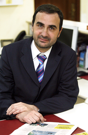 Galician politik, které patří do BNG. Narón, Galicie.